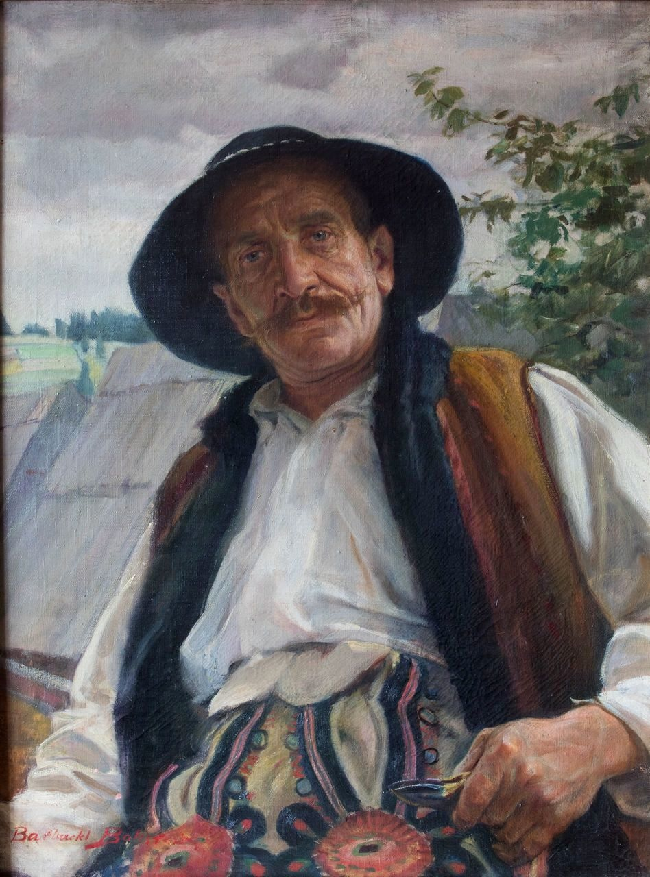 Baca z Białego Dunajca, 1933 Ludwik Cudzich olej, płótno, 79 x 60 cm